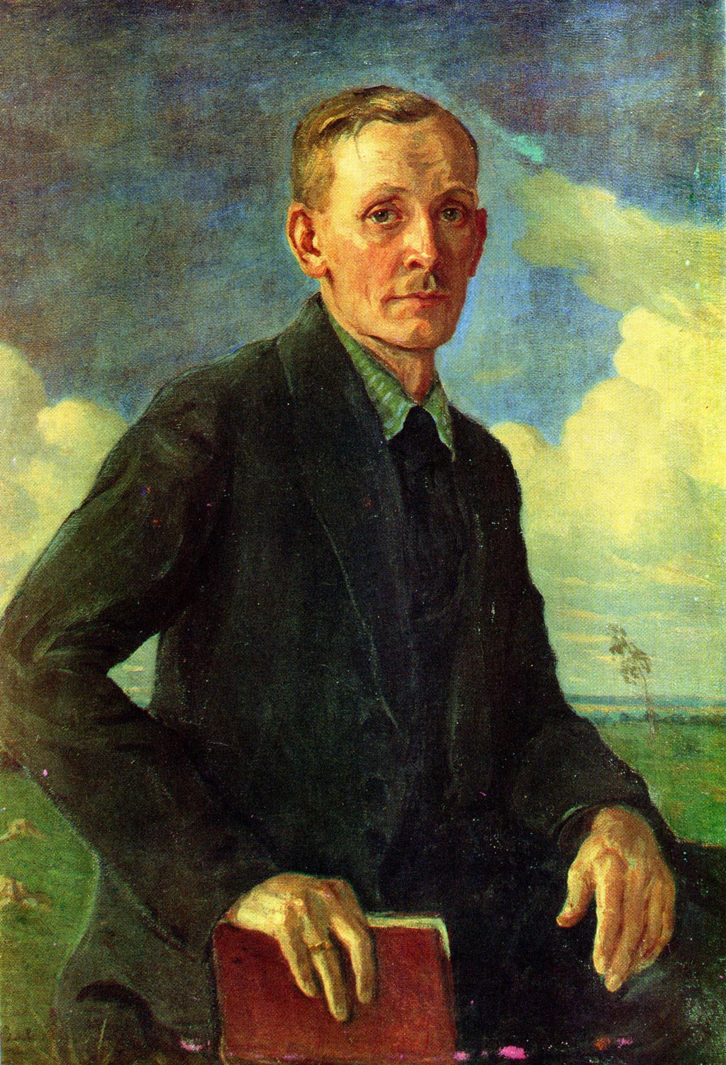 Д. Полазаў Янка Купала